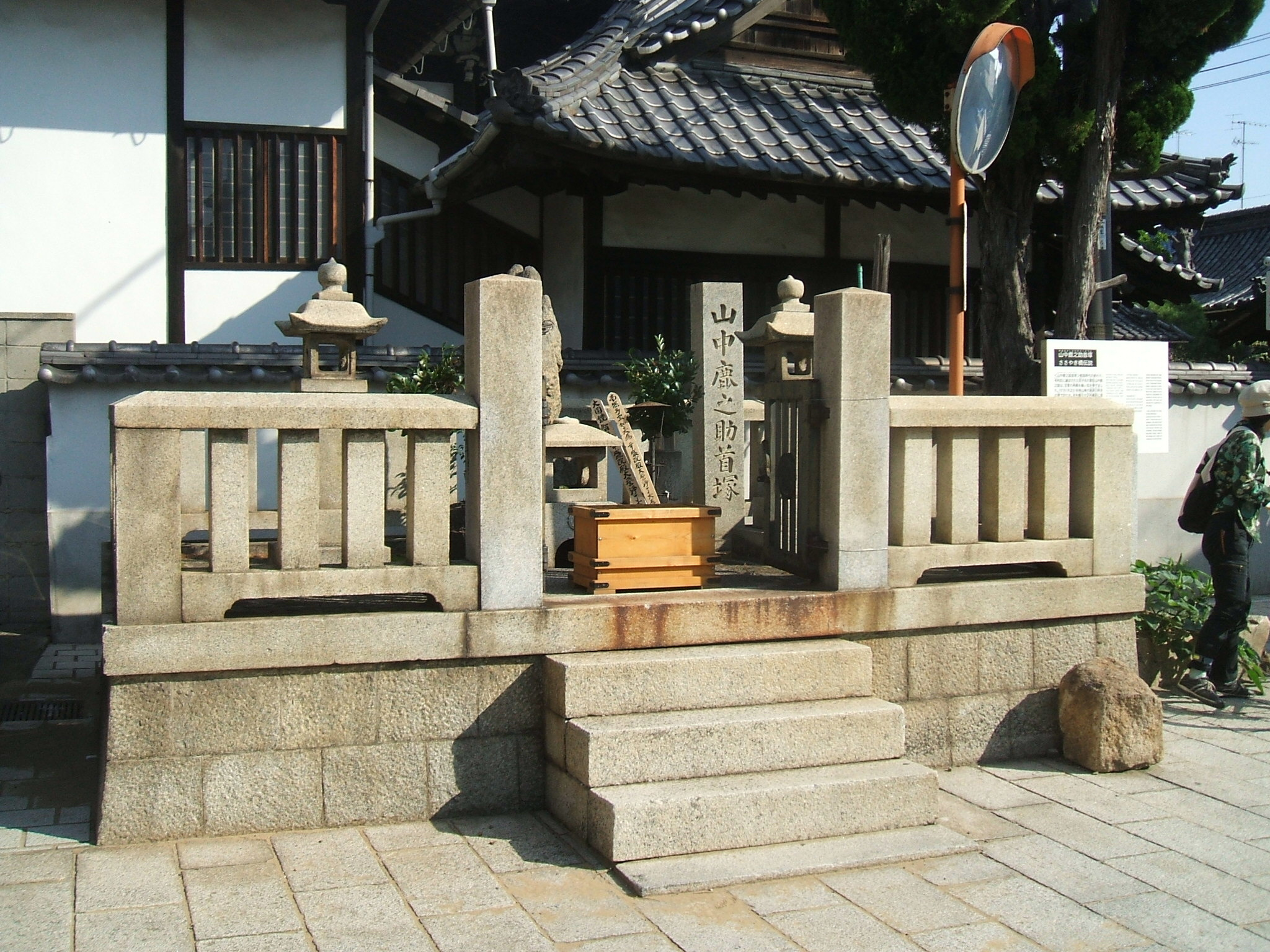 広島県福山市鞆町にある山中幸盛（鹿之助）の首塚。斬首された後当地に運ばれた彼の頭部は打ち捨てられていたが、地元の住民に手厚く供養され、現在も大切に祭られている。